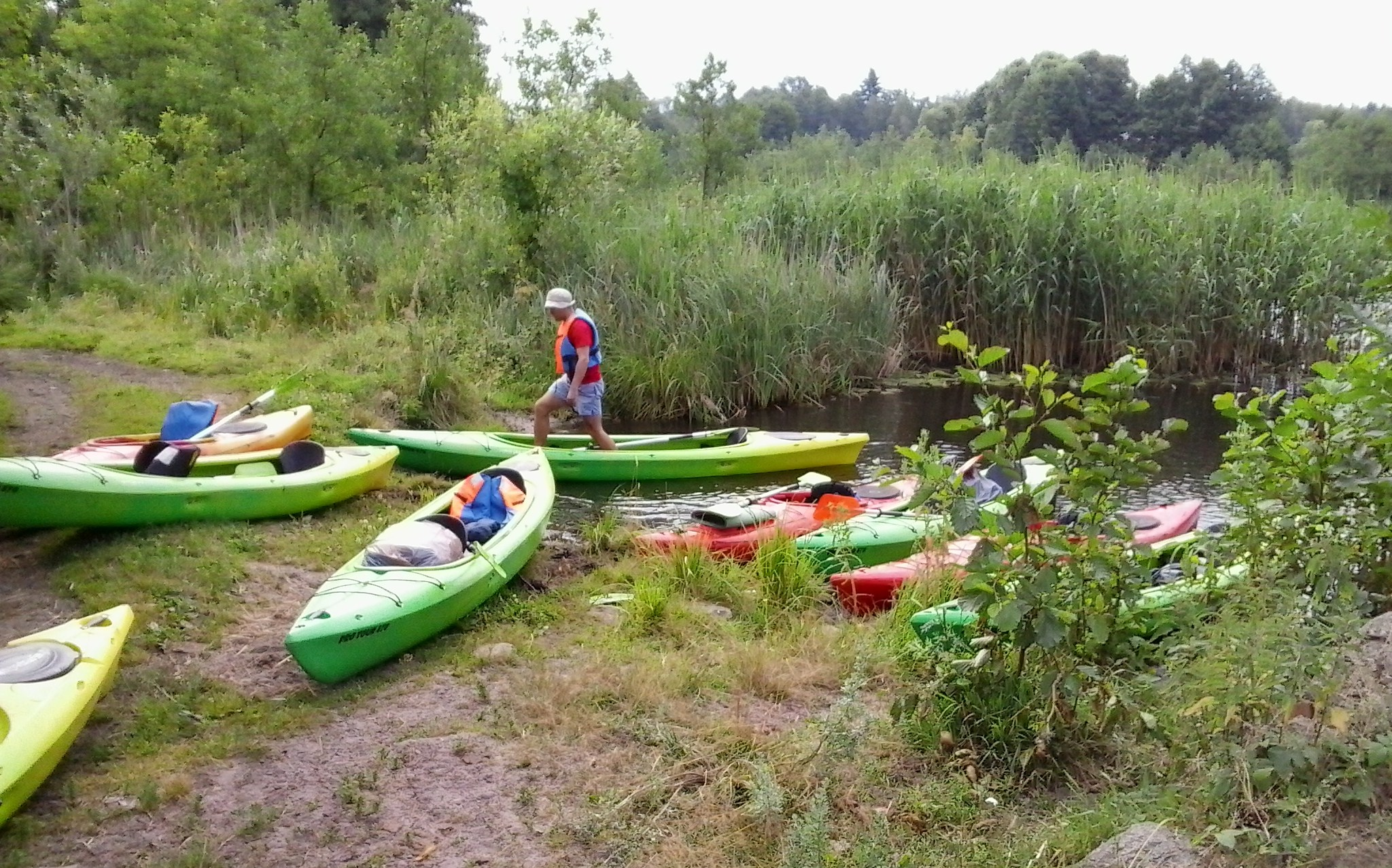 Spływ kajakowy - rzeka Miała w Puszczy Noteckiej.